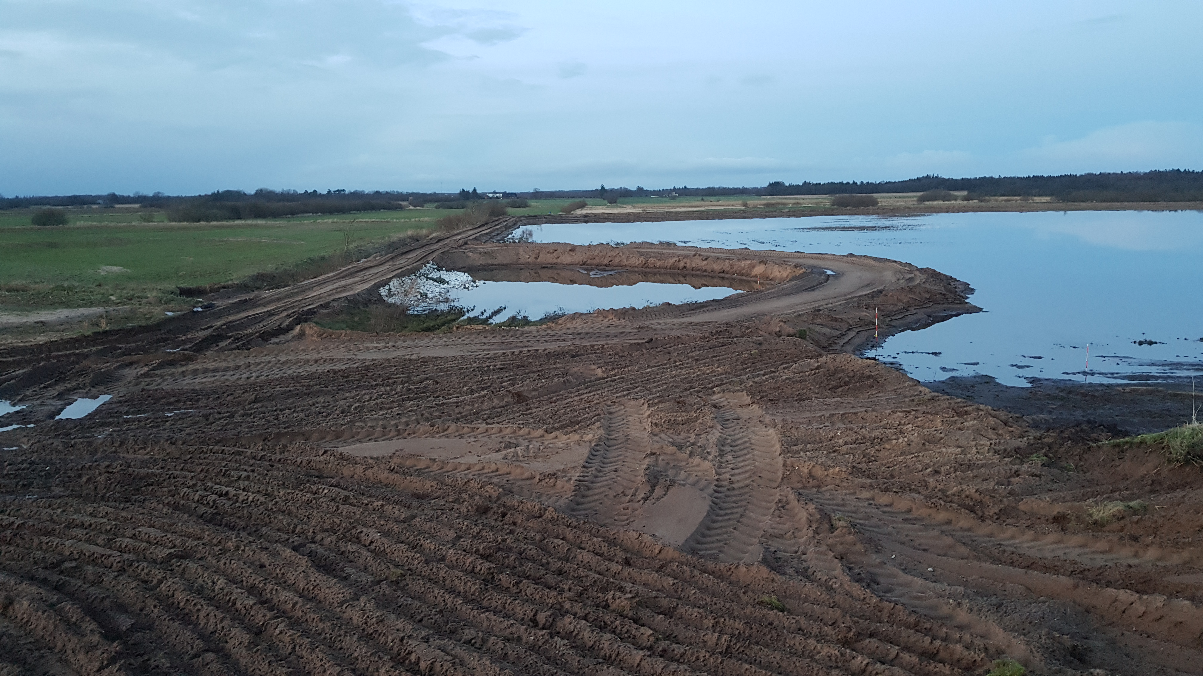 Det reparerede, meget omtalte brud i "Varmingdiget" øst for Ribe. Der er ikke tale om det dige der almindeligvis kendes som "Varmingdiget" og som fornyligt blev renoveret, men derimod et andet mere anonymt dige længere østpå, som strækker sig fra punktet her og til Stavnagervej. Adskillige hundrede meter af diget er nu forstærket med sand fra indlandsklitten umiddelbart bag fotografen.